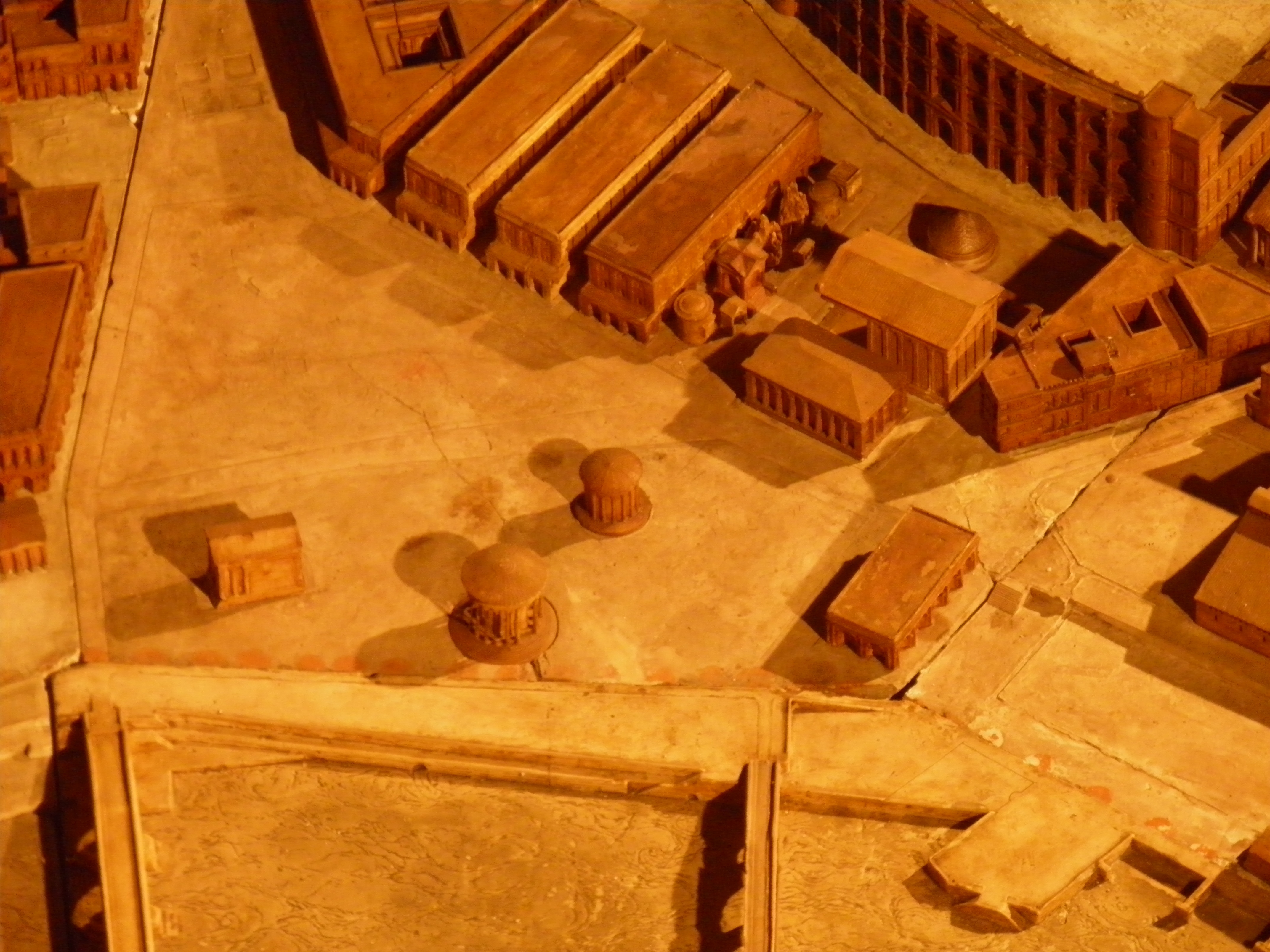 Forum Boarium, plan de Rome de Paul Bigot, université de Caen MRSH